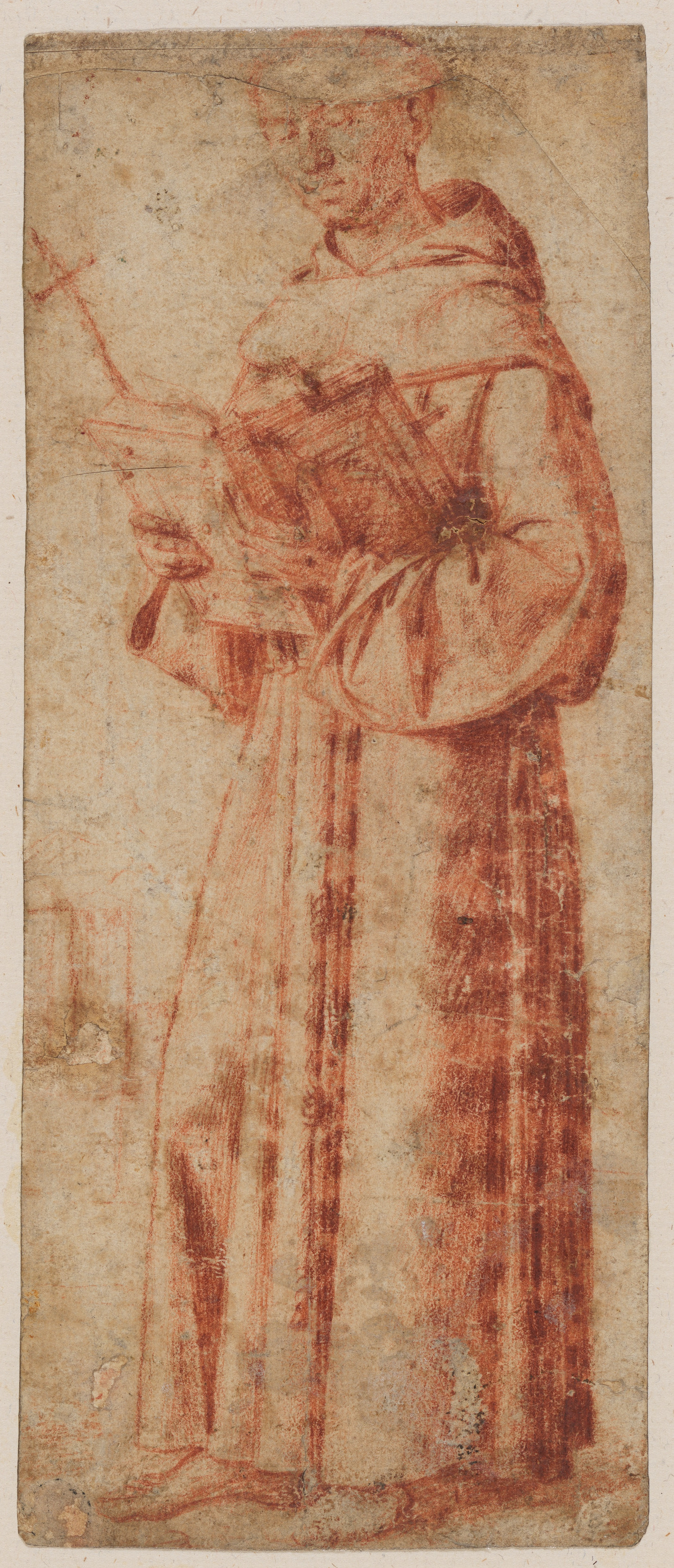 Drawing; Drawings